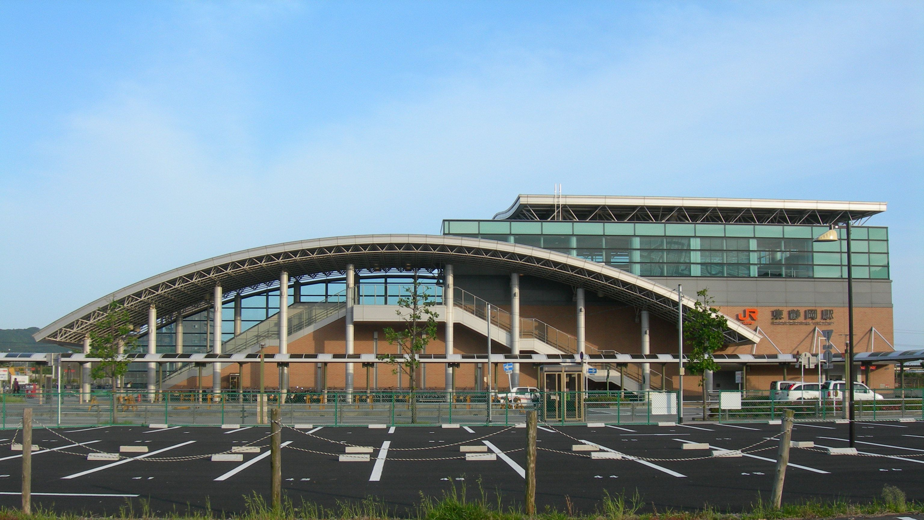 東静岡駅